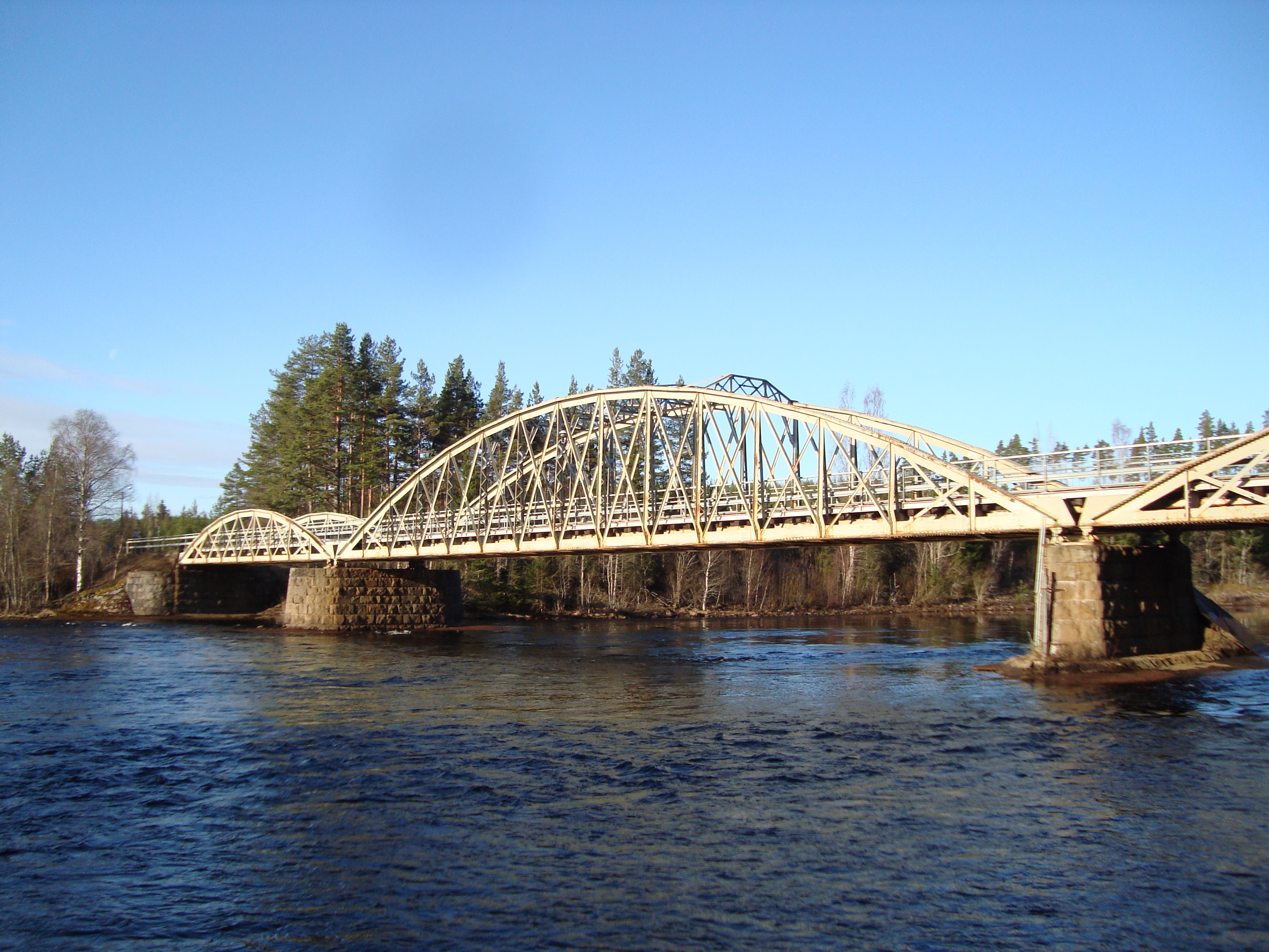 Oxbergsbron, Mora och Älvdalens kommuner, Sverige